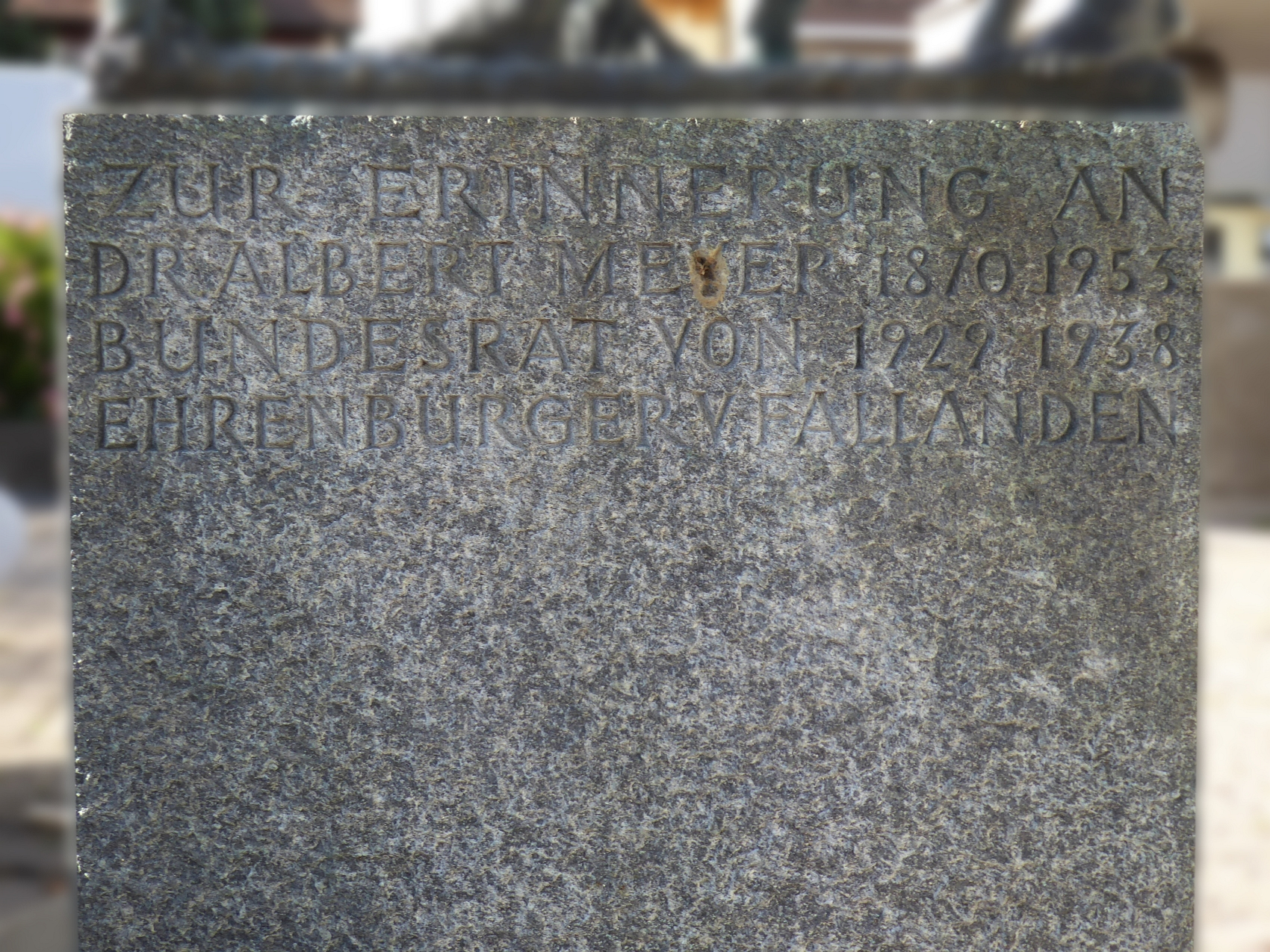 Brunnen Skulptur, 1960, von Walter Hürlimann (1934-2005) für Albert Meyer (1870-1953) Politiker. Standort, Gemeindeplatz von Fällanden, Zürich